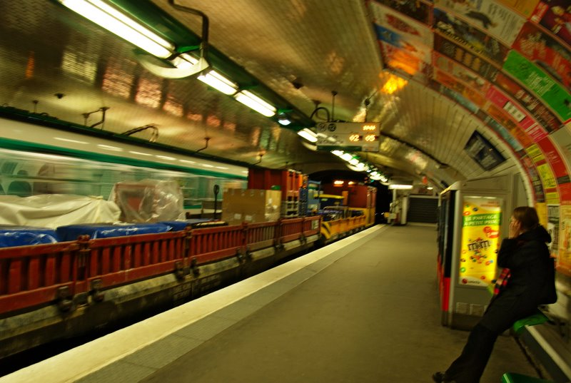 Surpris à Montparnasse, sur la ligne 12 MOW Sprague in Paris metro, at Montparnasse line 12.